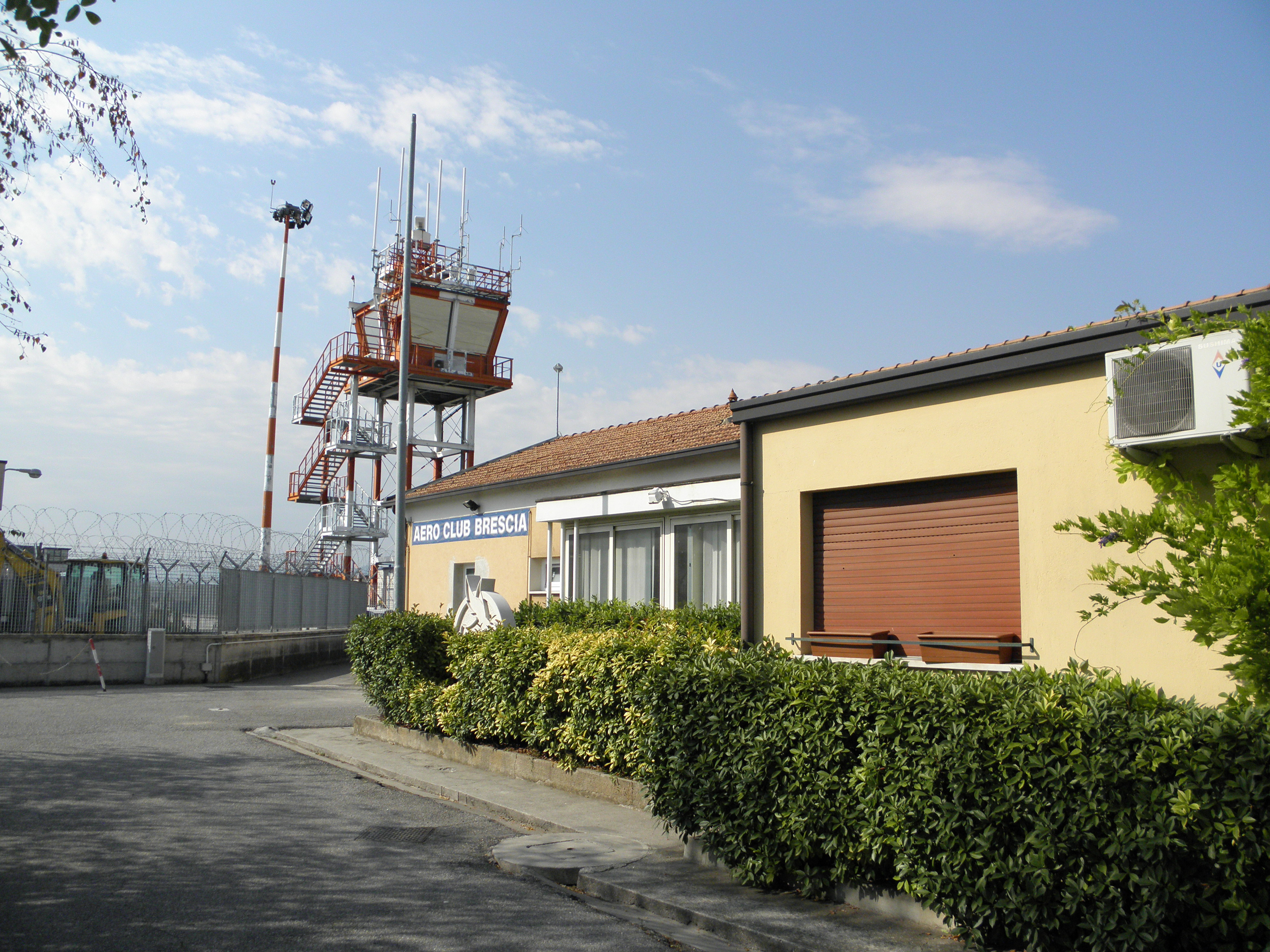 Montichiari, Aeroporto di Brescia-Montichiari "Gabriele D'Annunzio": la sede dell'Aero Club Brescia e la torre di controllo.